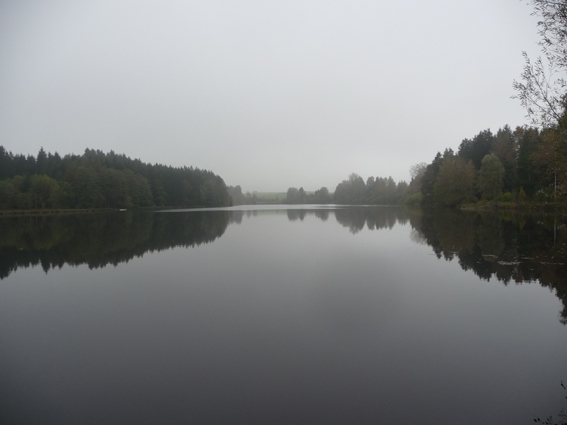 Engelsrieder See vom Wehr aus fotografiert.